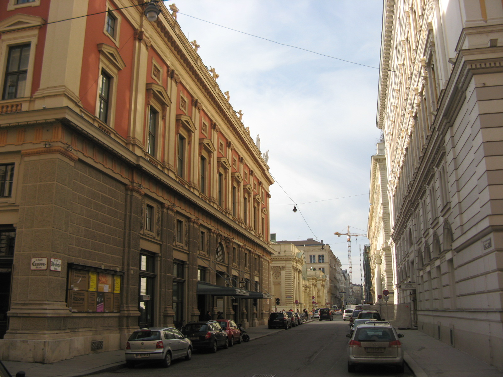 Bösendorferstraße von der Canovagasse nach Westen